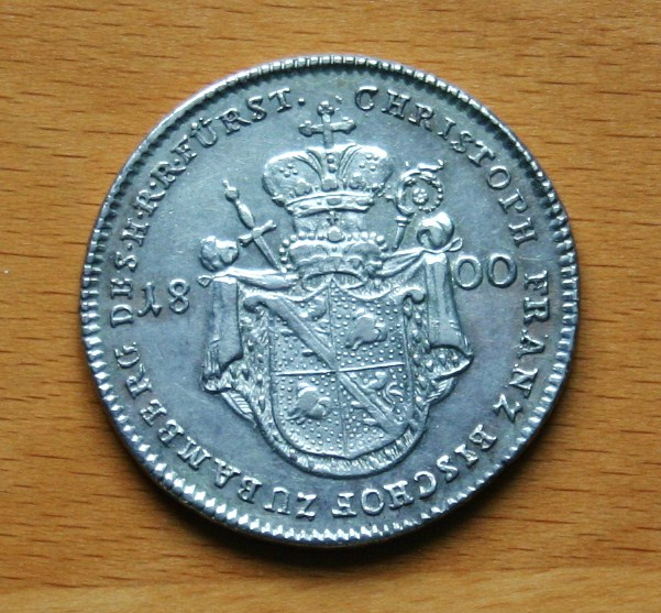 Revers des Konventionstalers von 1800 Christoph Franz von Buseck